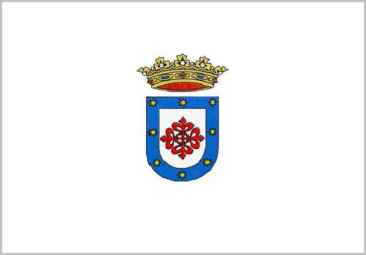 bandera real de miguelturra recogida en los archivos del municipio